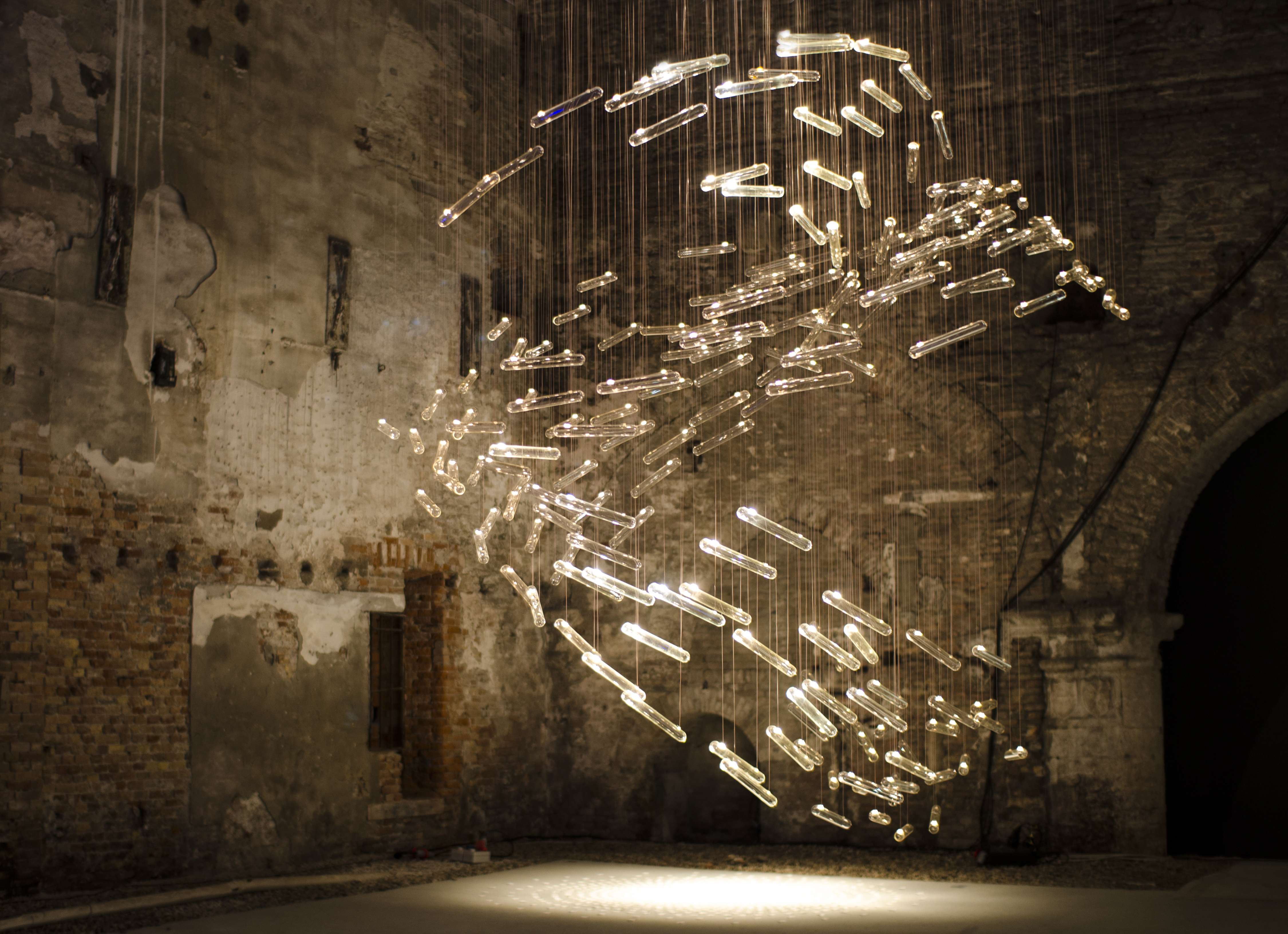 Photo by Juuke Schoorl